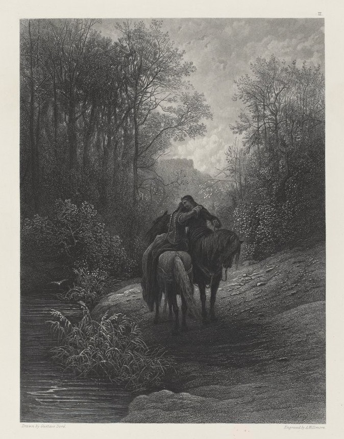 "Là, ils se donnèrent un baiser et se séparèrent en larmes", dessin de Doré pour illustration du poéme "Genièvre" de Alfred Tennyson